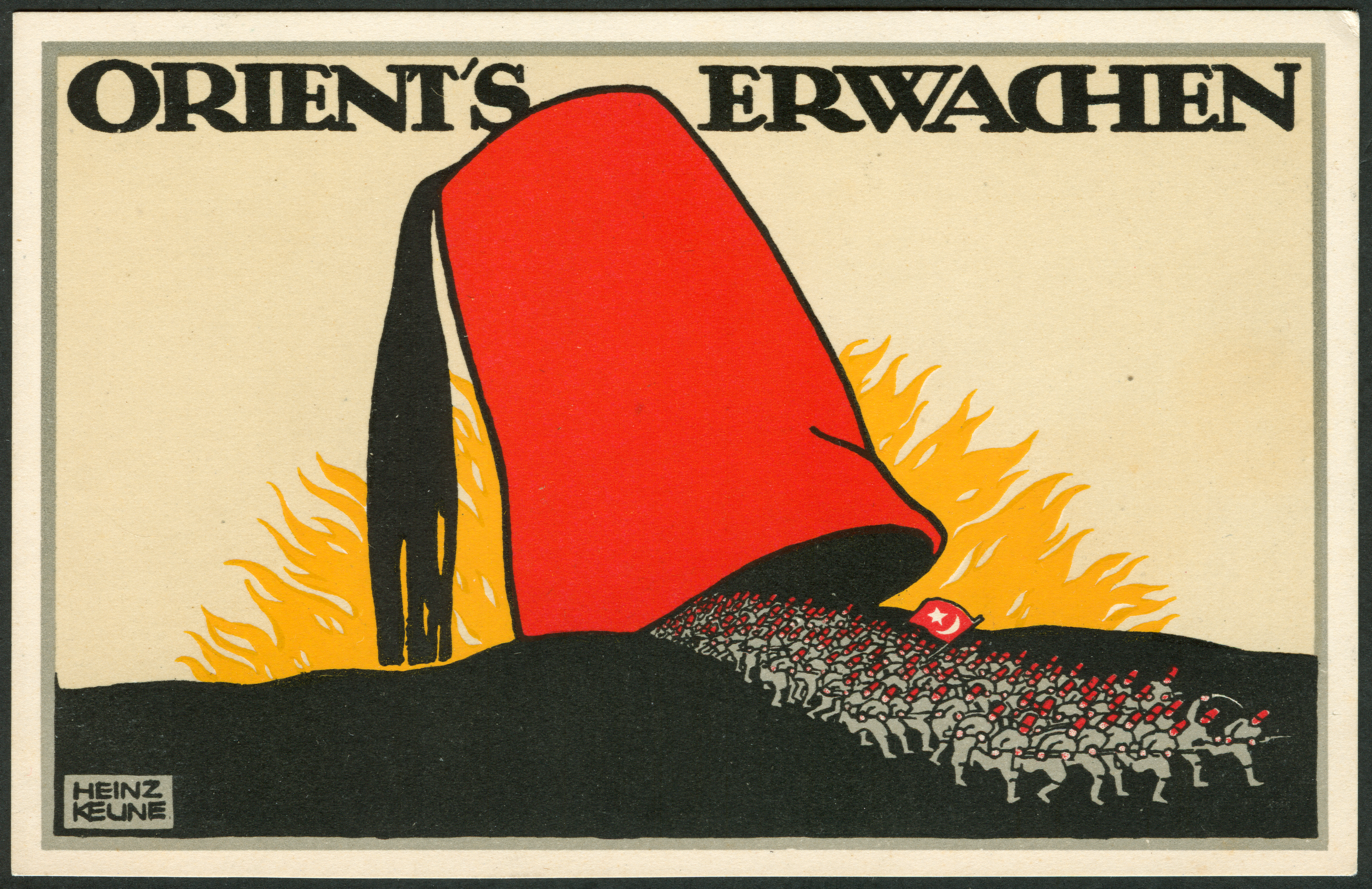 Bildseite der „Künstler-Kriegs-Postkarte No. 1 von J. C. König & Ebhardt, Hannover“ die der Grafiker Heinz Keune um 1914 übertitelte „Orient's Erwachen“ ...